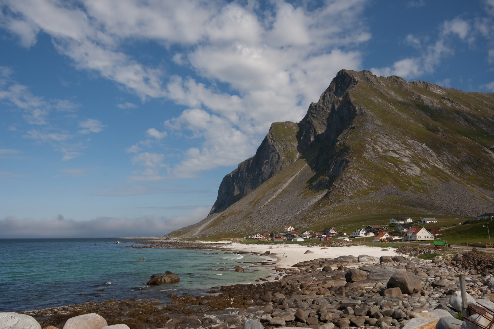 Vikten nordvest på Flakstadøya